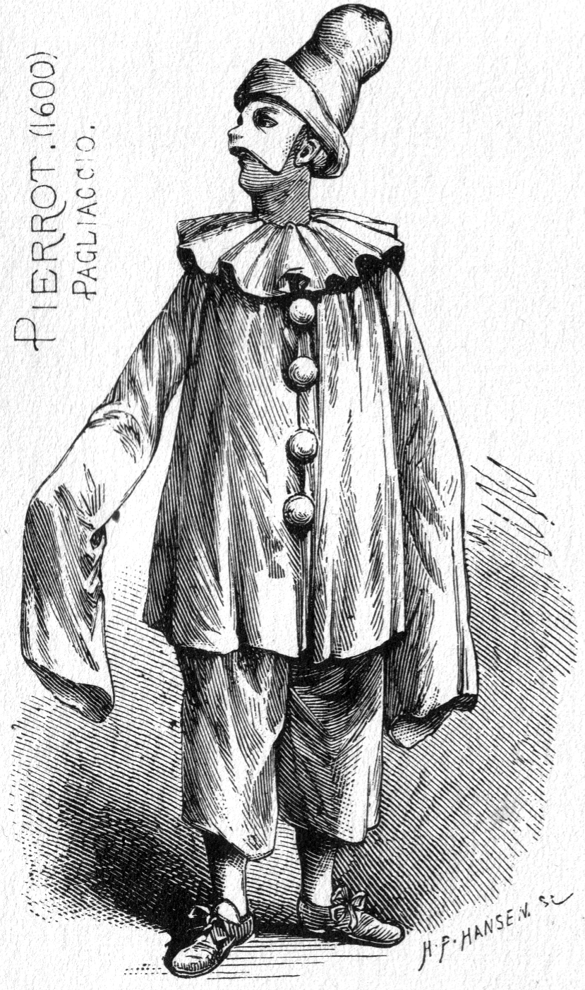 Pjerrot